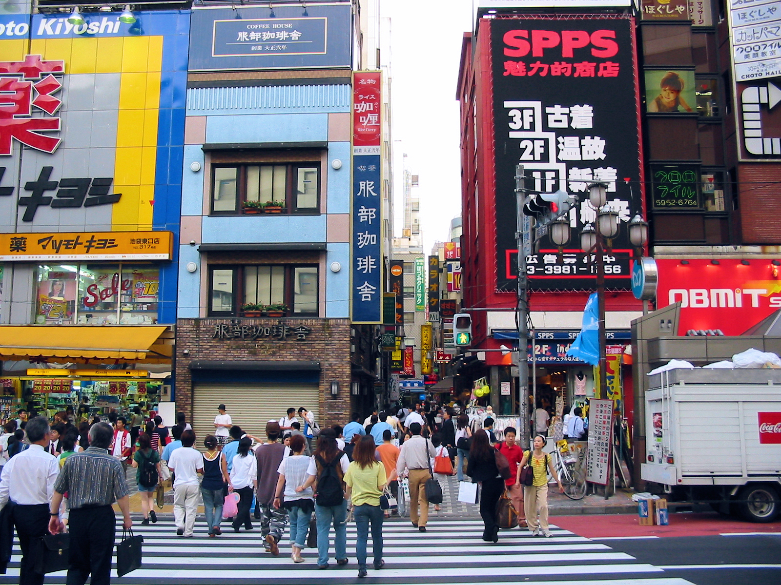 Ikebukuro, Tokyo.